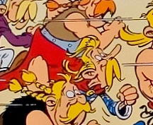 Assurancetourix. Détail d'une peinture murale avec Astérix et Obélix, héros de la BD de Goscinny et Uderzo. Lieu : Rue de la Buanderie 33/35 (Washuisstraat 33/35), École maternelle 8/2, ville de Bruxelles, Belgique. Extrait retouché de File:Astérix & Obélix Bruxelles rue de la Buanderie (cropped).jpg.